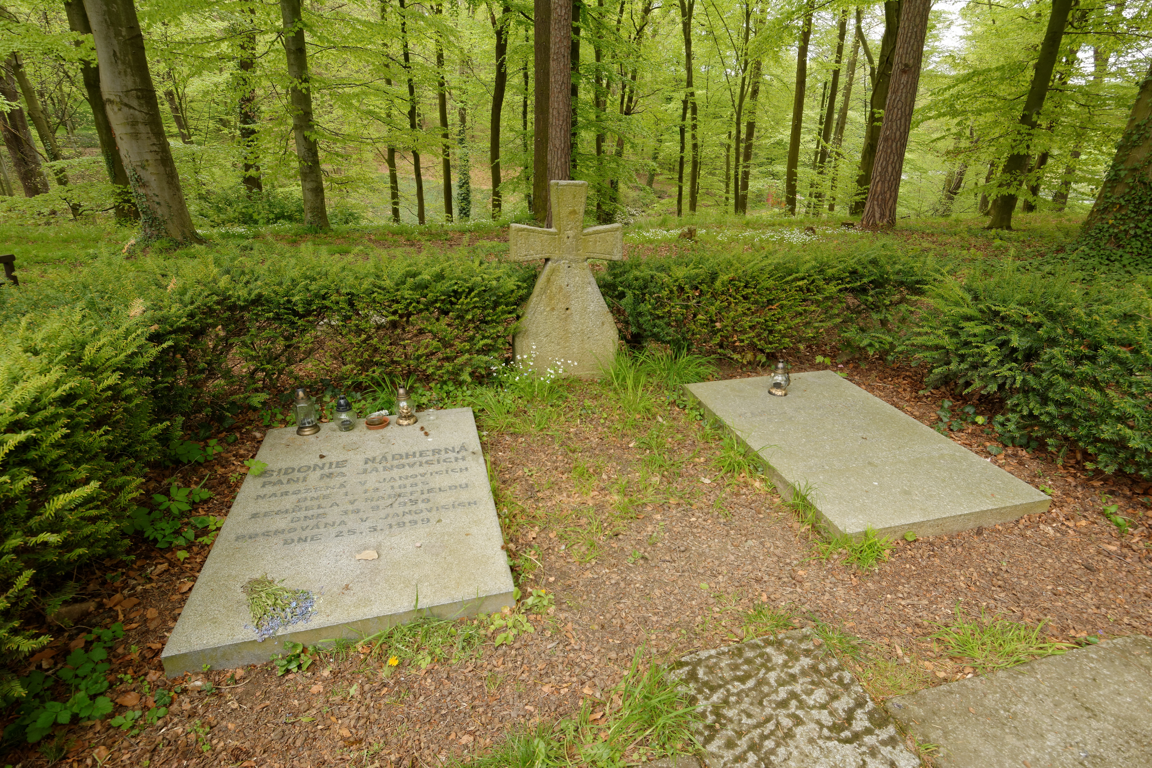 Vrchotovy Janovice, zámecký park, hřbitov rodiny Nádherných z Borutína. Hroby Sidonie a Karla Nádherných.